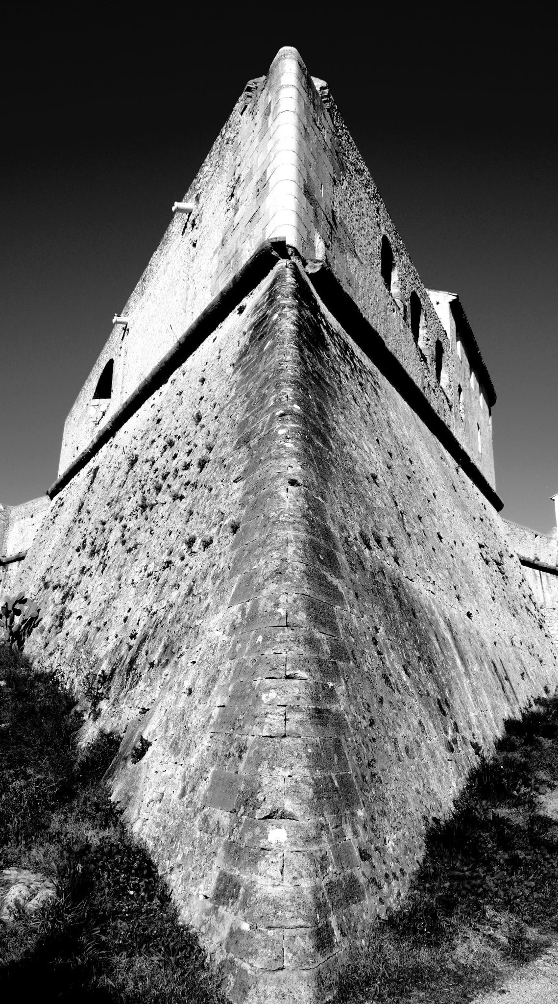 une "Aile" du Fort Carré à Antibes